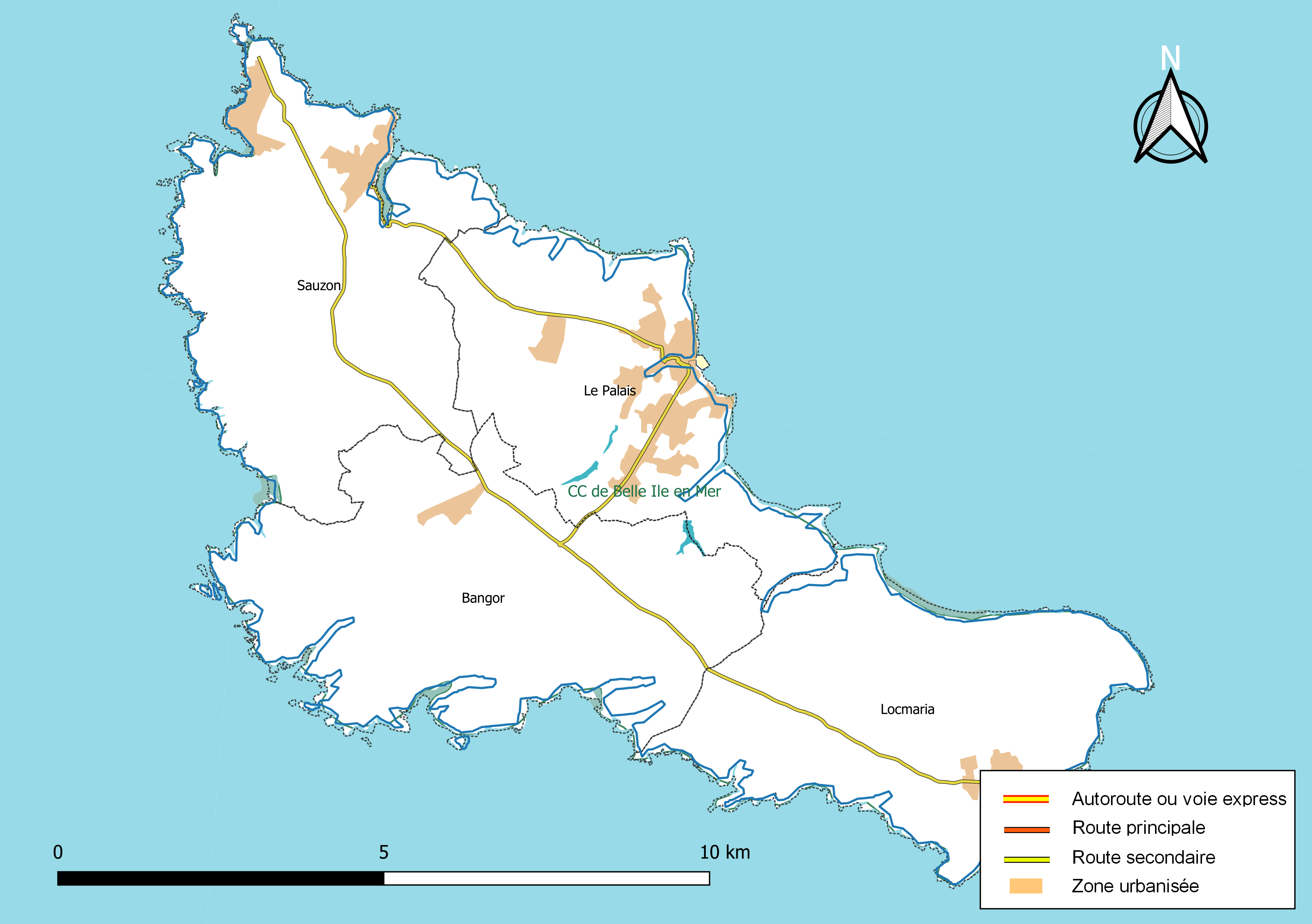 Carte géographique de la Communauté de communes de Belle-Île-en-Mer, département du Morbihan, France. Composition au 1er janvier 2019.